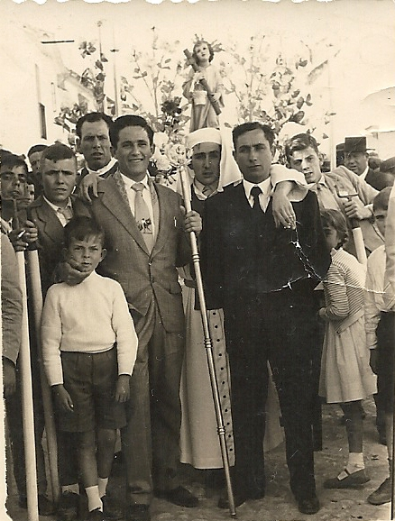 Procesión de la Hermandad del Dulce Nombre, actual Hermandad del Santísimo Cristo Resucitado, por las calles de Herrera